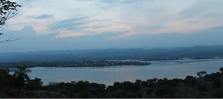 Panorama de simiti